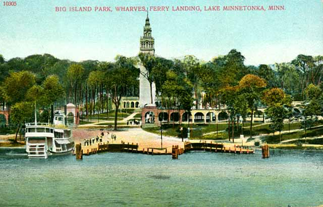 Big Island Park